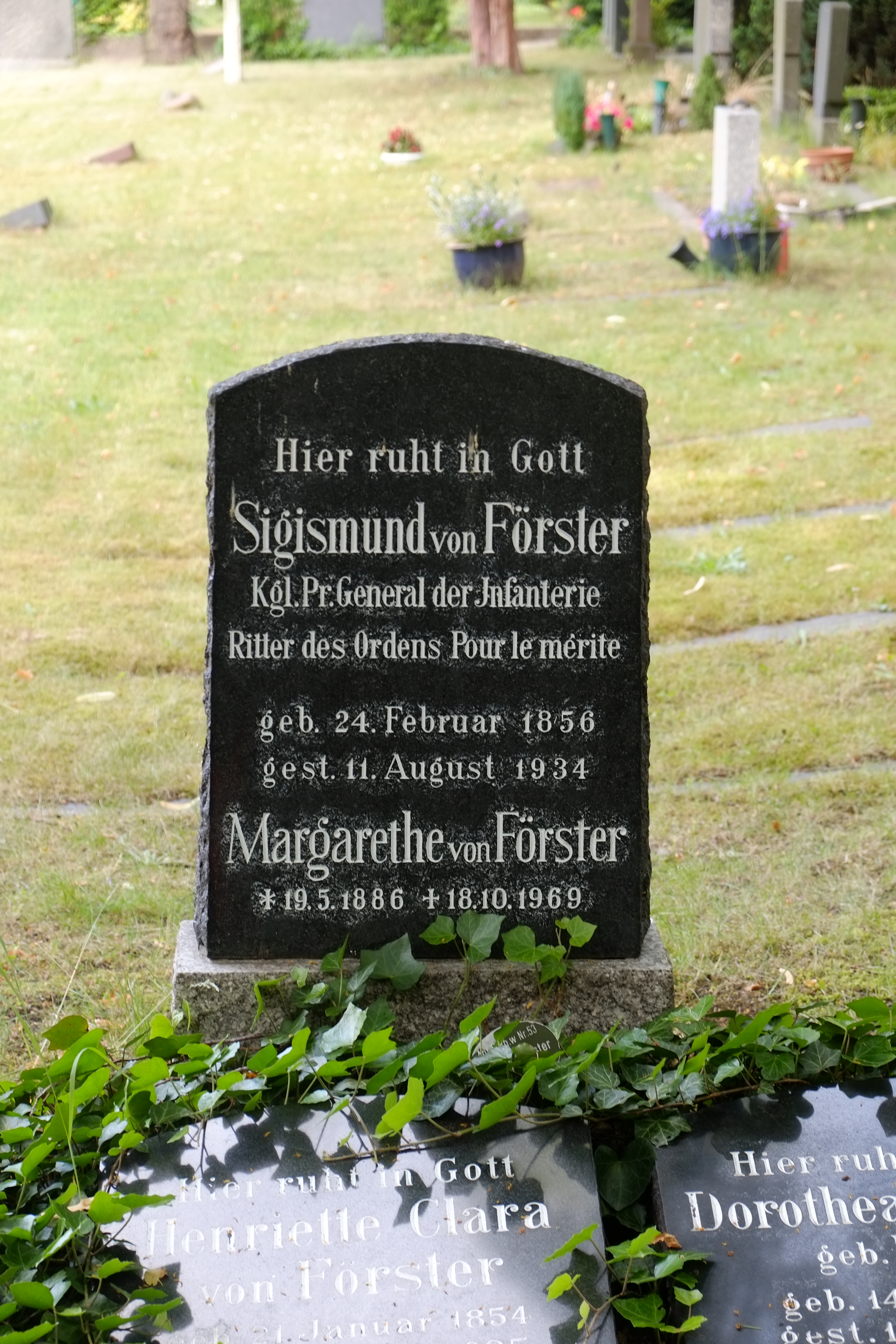 Das Grab von General der Infantrie Sigismund von Förster (1856–1934) in Berlin